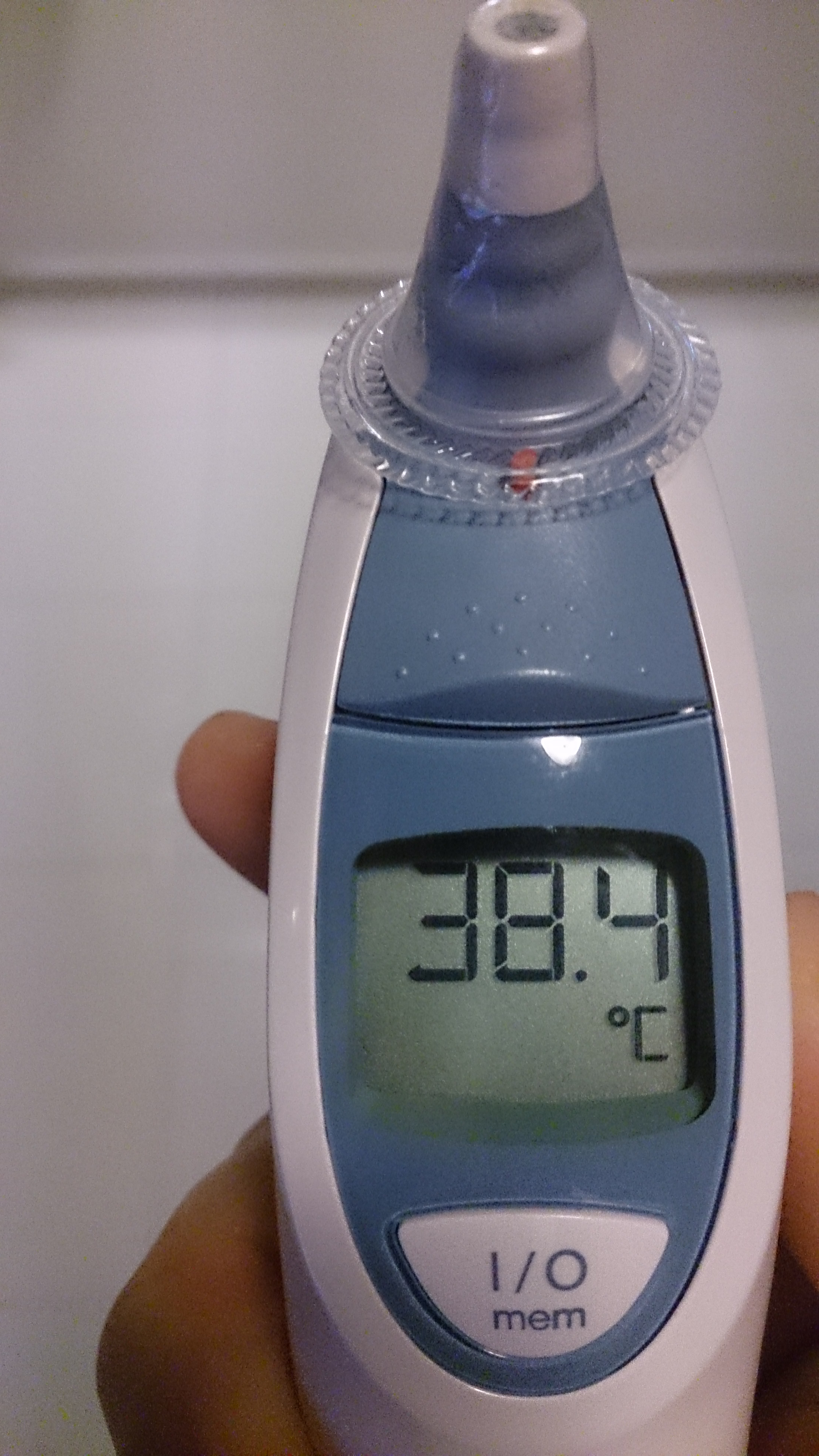 fever